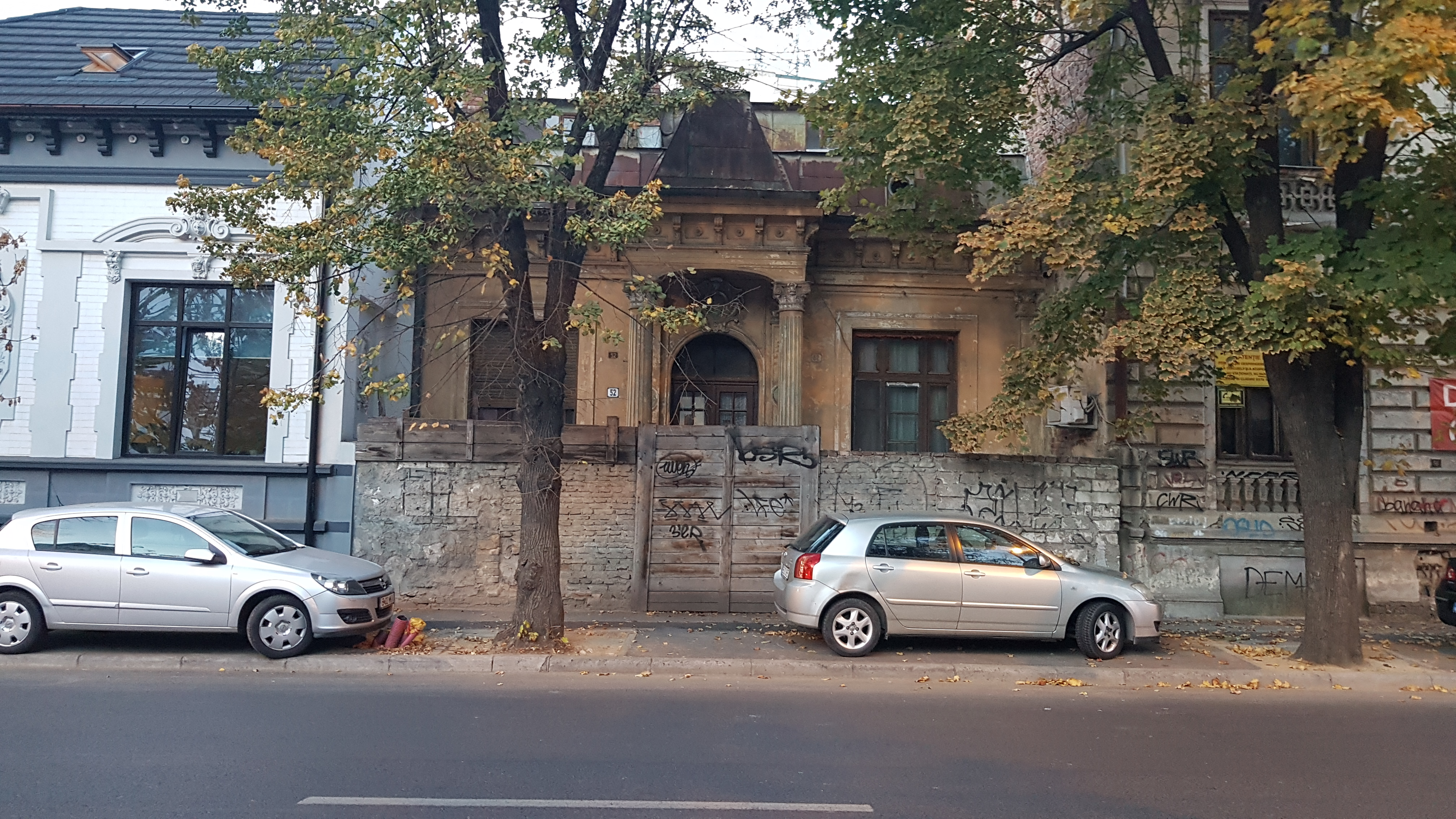 Casă, monument istoric